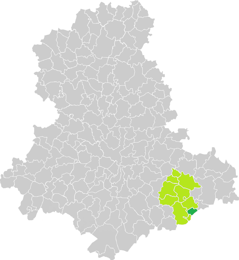 Carte de situation de la commune de Saint-Gilles-les-Forêts (en vert foncé) dans le votre Canton (en vert clair) sur une carte des communes de la Haute-Vienne